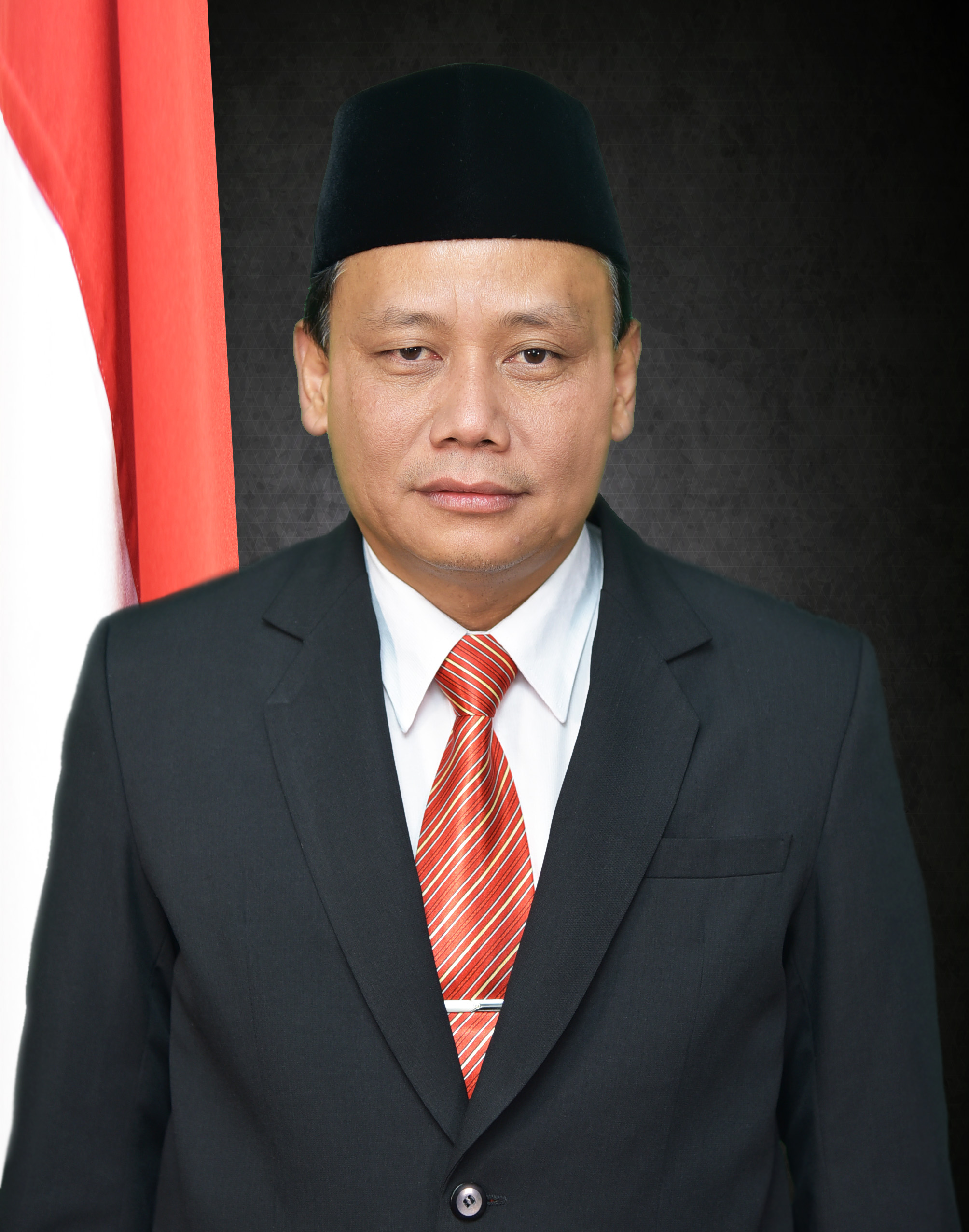 Abhan